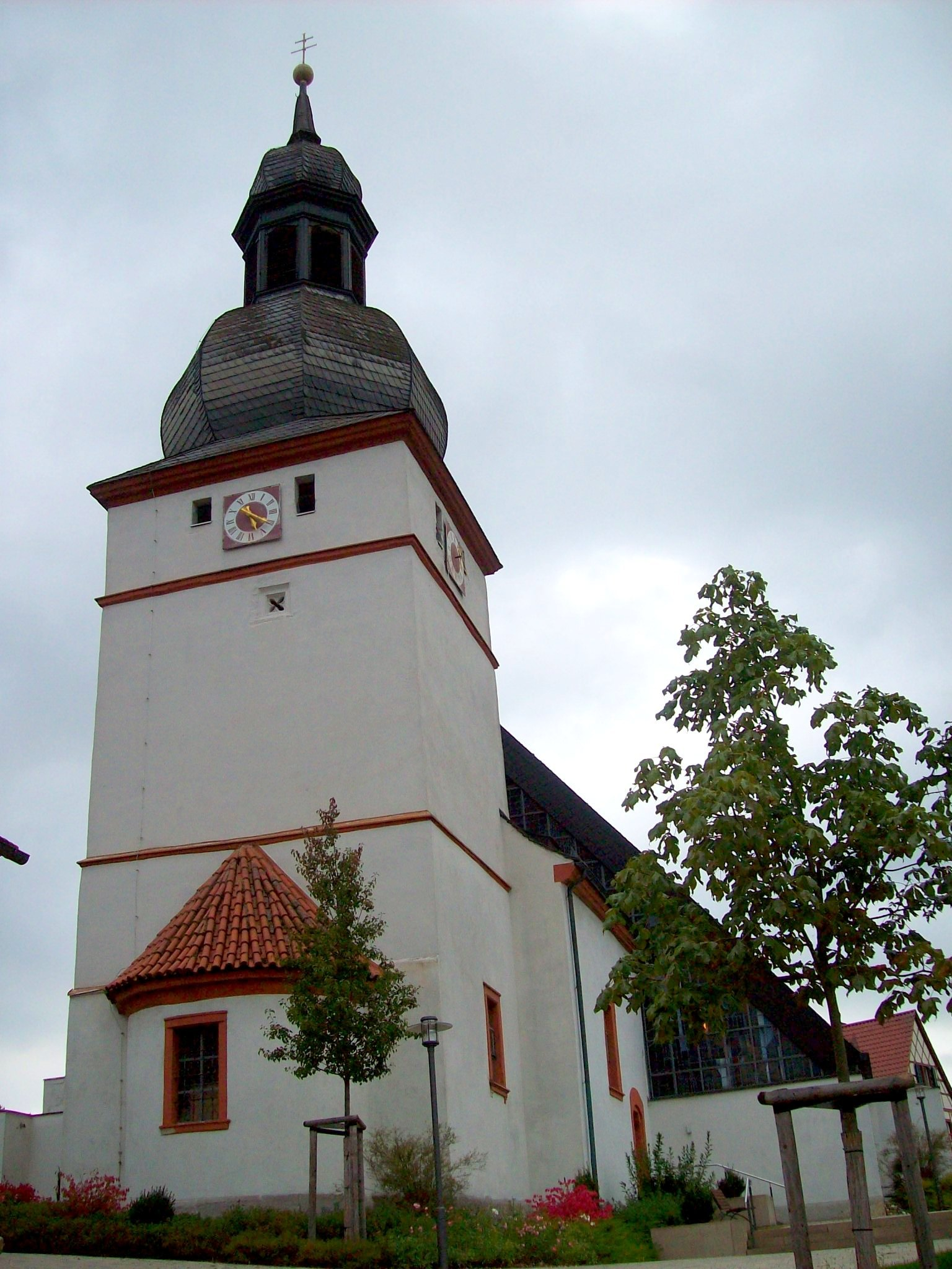 Katholische Kirche St. Jacobus der Ältere, Trossenfurt. Saalbau mit Satteldach und Chorturm mit halbrunder Apsis und Zwiebelhaube mit Laterne, Sandstein, 13. Jahrhundert, Chor 15. Jahrhundert, Langhaus im 18. Jahrhundert verändert, 1922 erweitert, um 1980 erneuert; mit Ausstattung